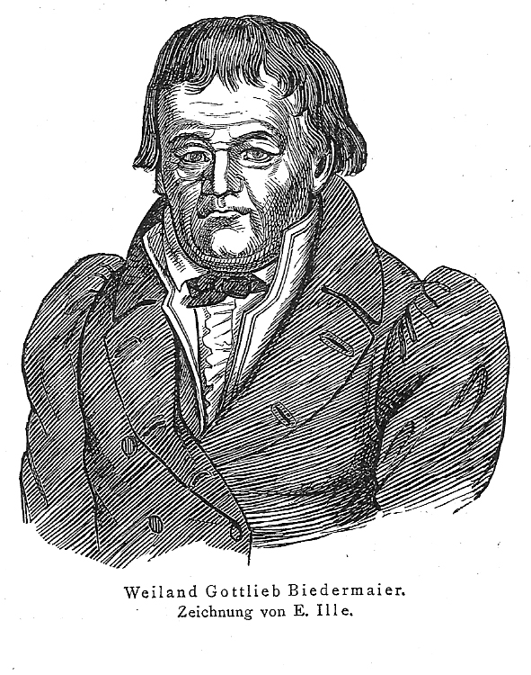 Bildnis Gottlieb Biedermaiers aus den Münchener Fliegenden Blättern (21. Jahrgang (1855), Nr. 493, 103) Scan --Goerdten 21:43, 2. Feb. 2007 (CET)